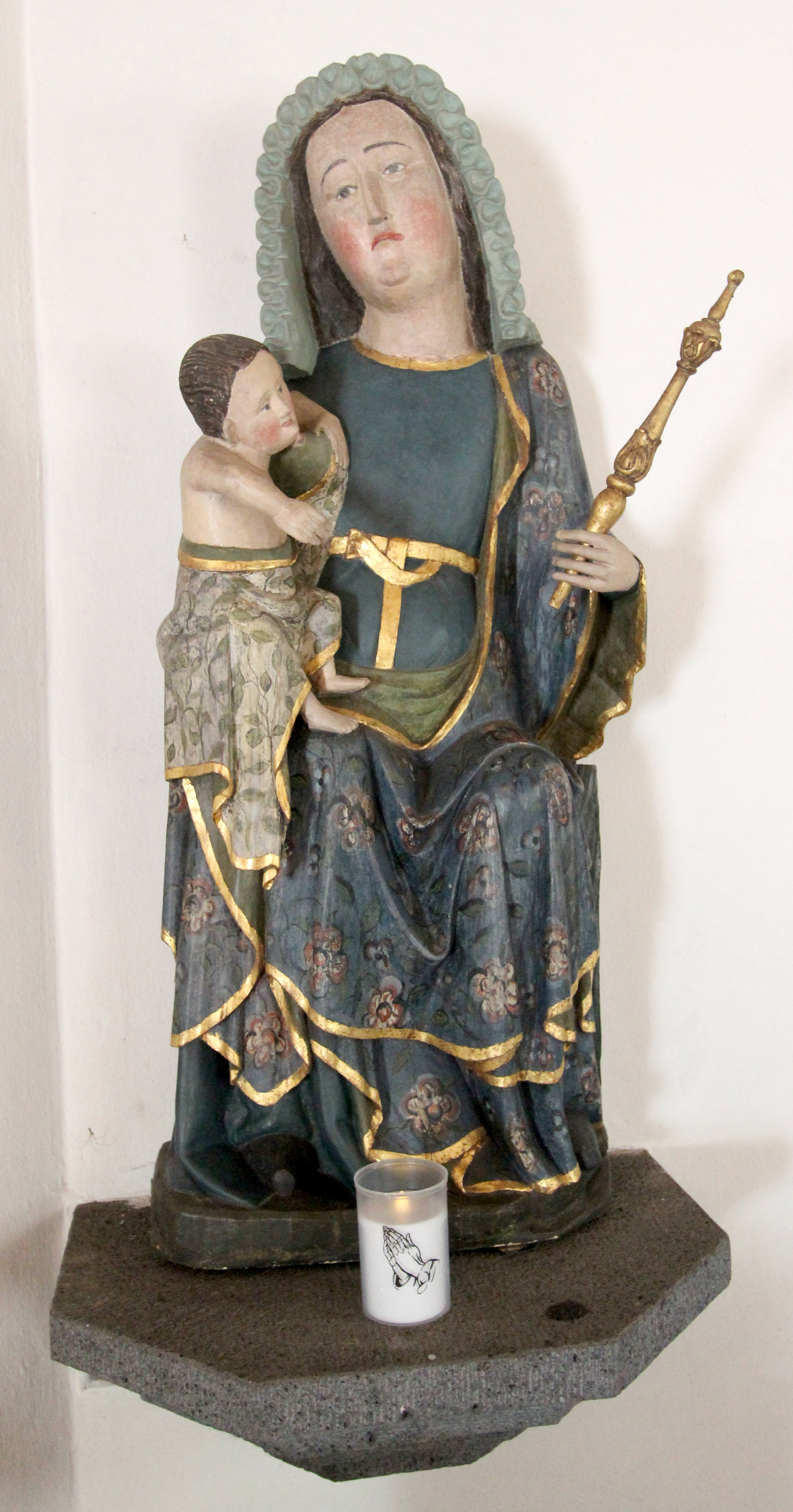 Katholische Filialkirche St. Donatus, 54550 Gemünden, Lieserstraße. Zweiachsiger Saalbau, bezeichnet 1731. Aufnahme von 2019.